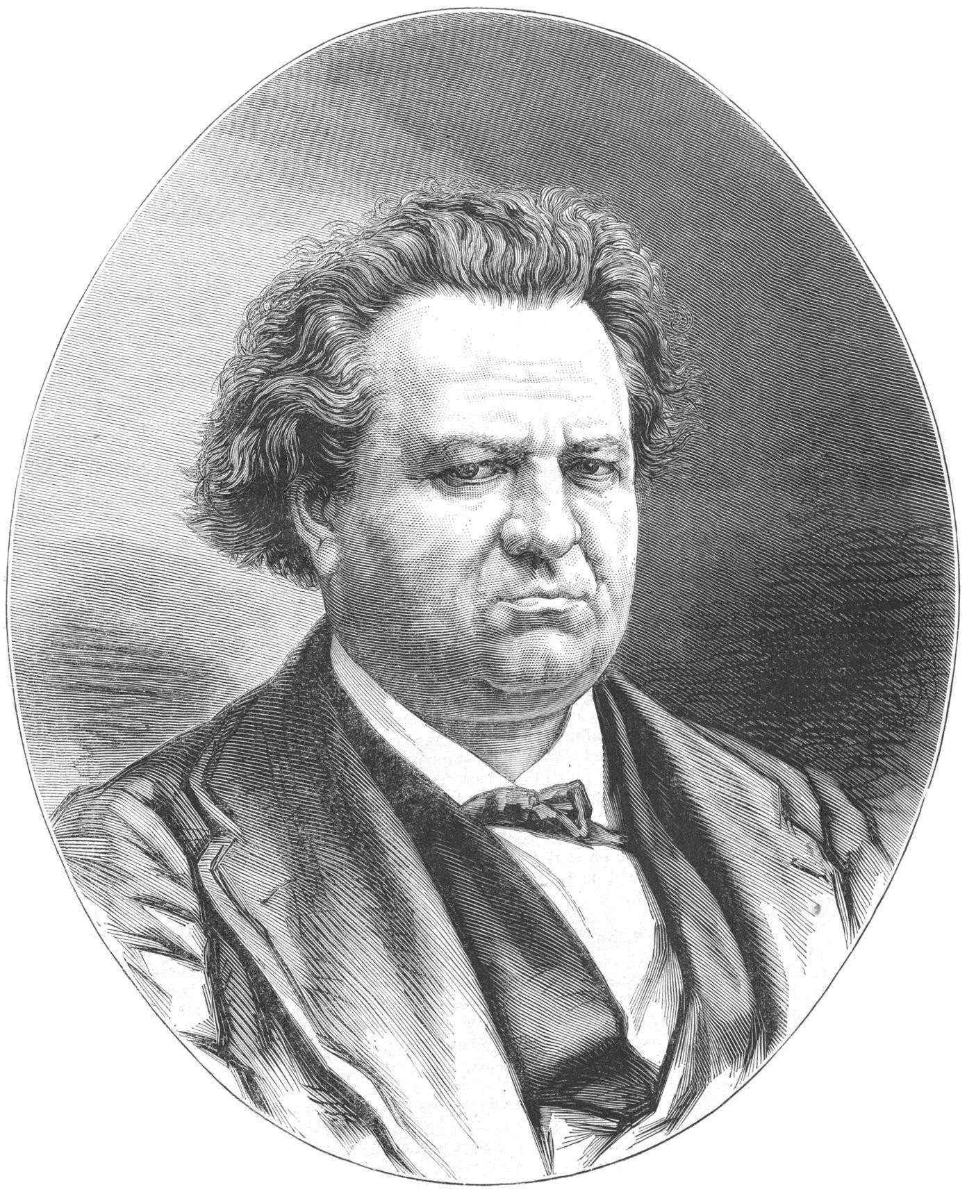 "M. Ricard, ministre de l'Intérieur, décédé".